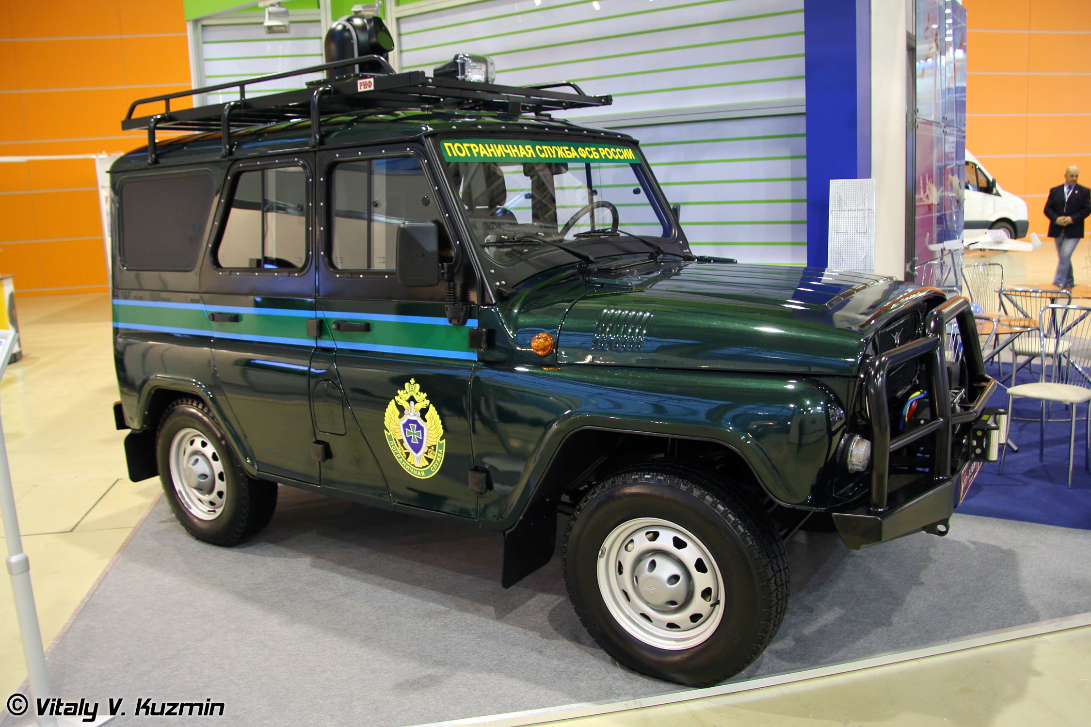 Мобильный комплекс контроля наземной обстановки Страж (Mobile ground situation control complex Strazh)